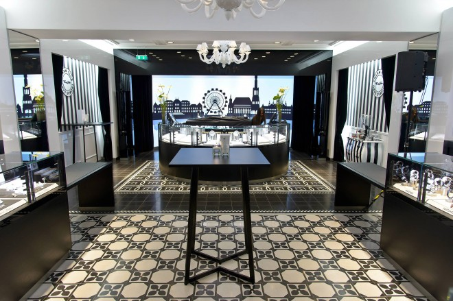 THOMAS SABO Shop Wien Seilergasse 4 InnendekoShop Wien Seilergasse 4